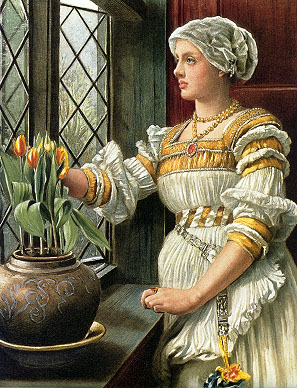 Mariana